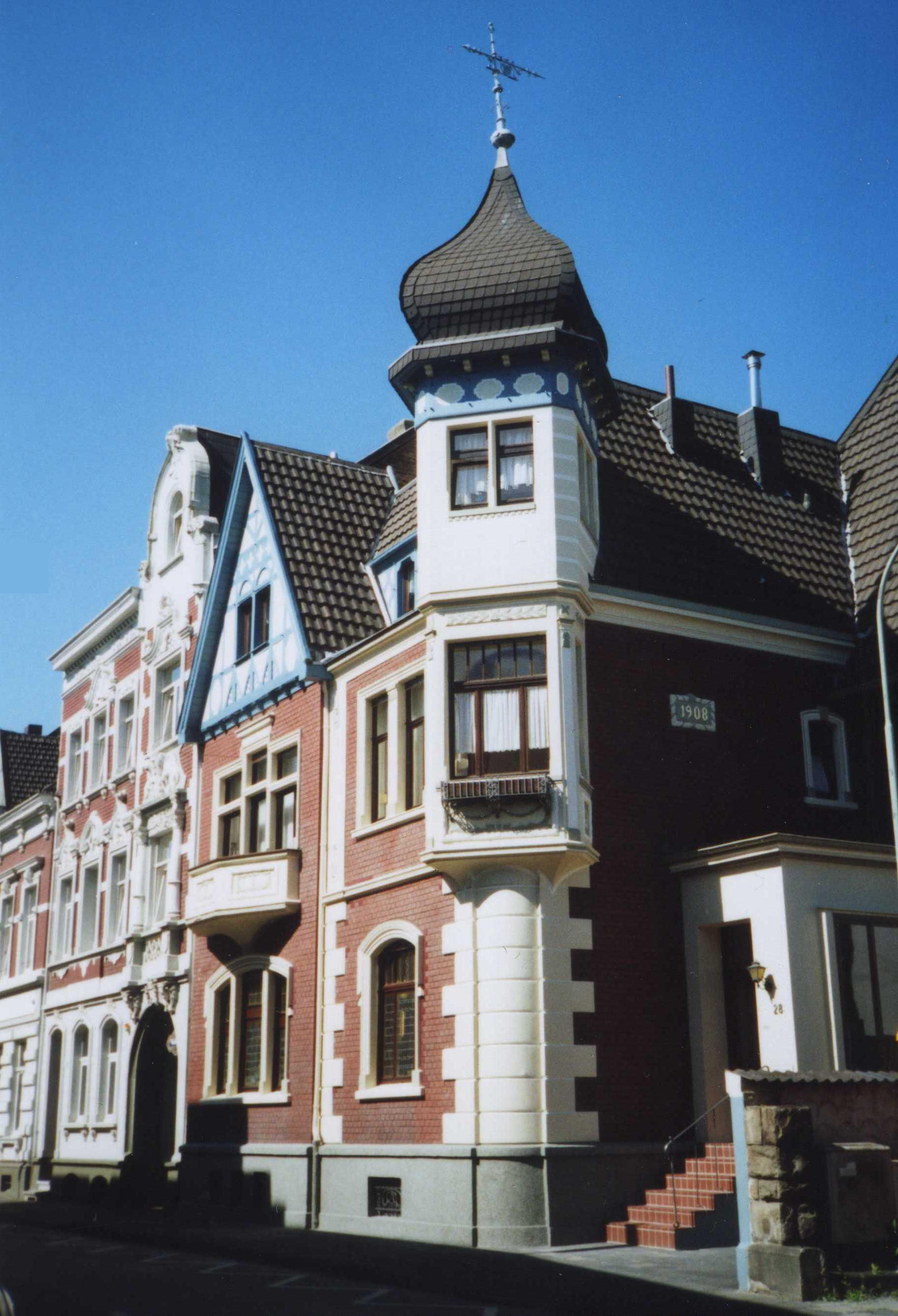 Jugendstilvilla von 1908 in der Englerthstraße der Eschweiler-Südstadt mit Pfeiler der ehemaligen Reichsbankfiliale